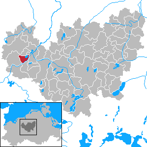 Rühn in Mecklenburg-Vorpommern - District Güstrow